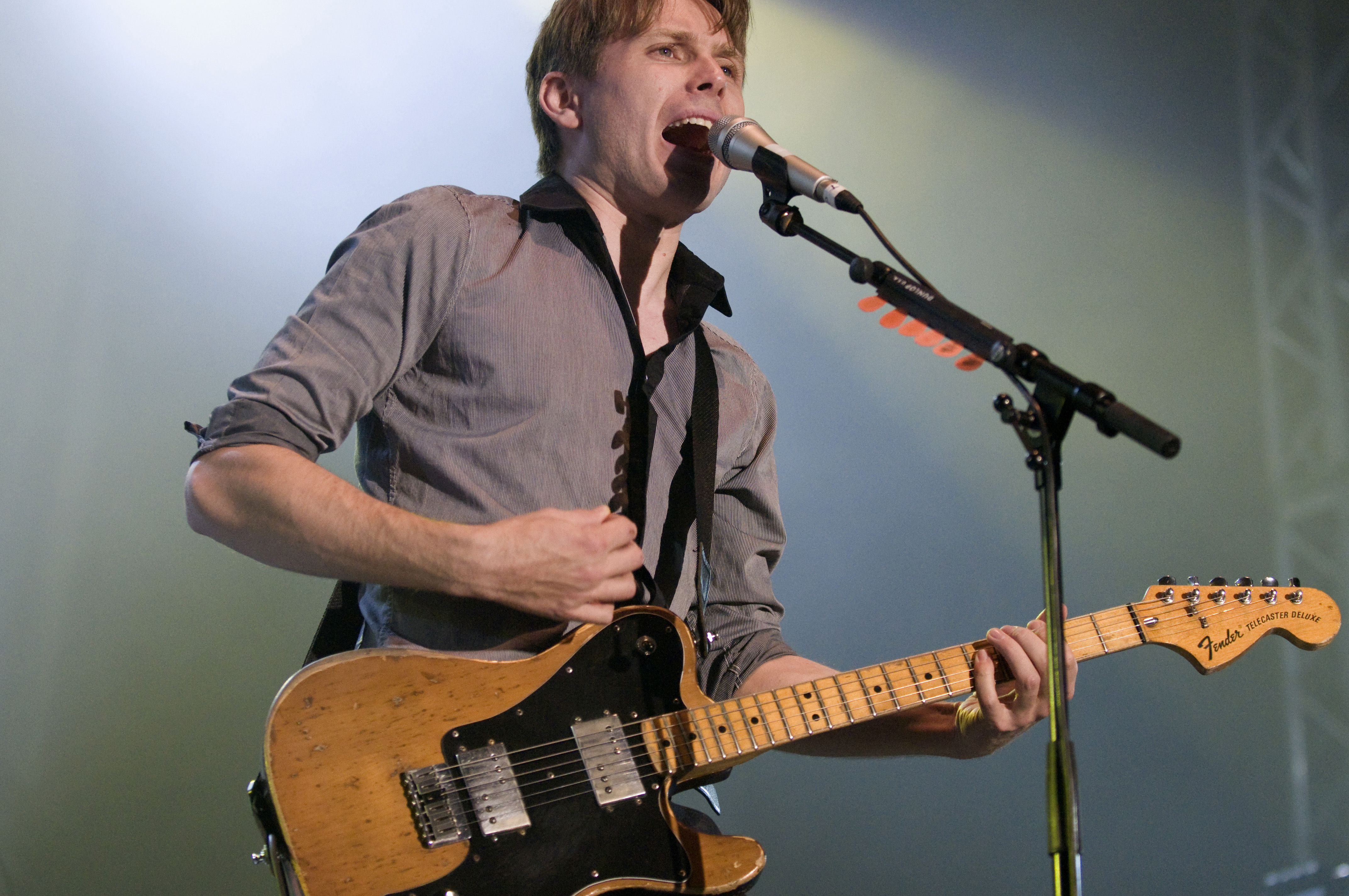 Franz Ferdinand (band)